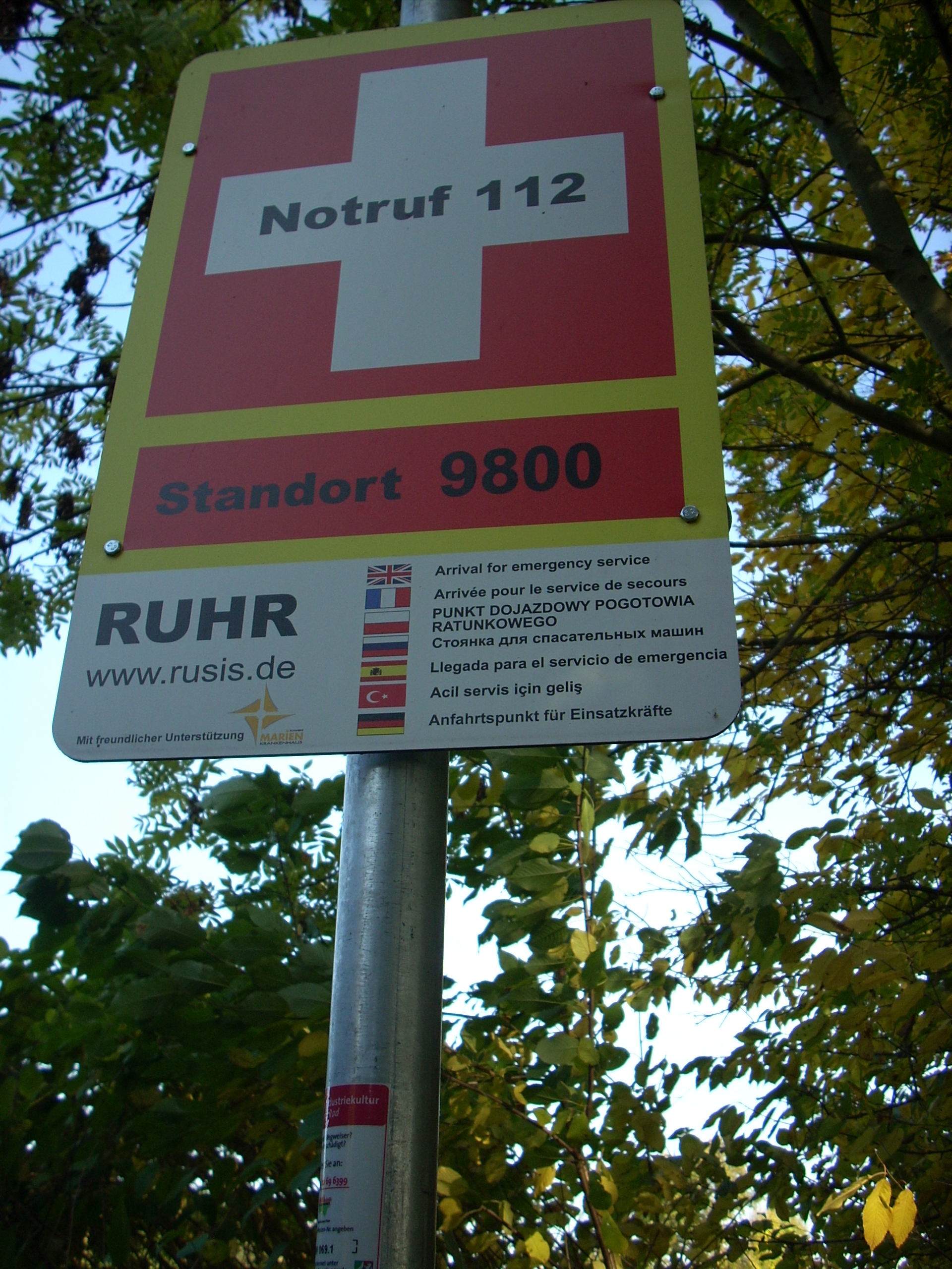 Rettungspunkt des Sicherheitssystems Rusis an der Ruhr bei Haus Ruhr nahe Schwerte.